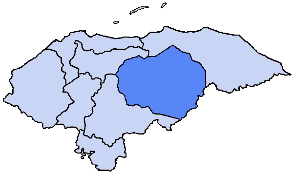 Mappa della diocesi cattolica di Juticalpa, in Honduras.